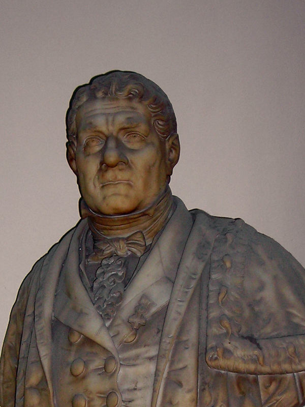 Busto di Carlo Barabino contenuto nel vano scala del Palazzo dell'Accademia a Genova, opera di Giambattista Cevasco. L'attribuzione é desunta da Federico Alizeri, Guida artistica per la città di Genova. Prima giornata, Genova, 1846. Viene infatti detto: "Mancava nell'Accademia Ligustica un monumento a quel grande che ne innalzava il palagio; e parecchi architetti, primo tra i quali Ignazio Gardella, lamentarono il difetto, e testè procacciarono il rimedio, commettendone l'effigie in marmo a Giambattista Cevasco, il quale mostrossi degno dell'onorevole scelta. Da pochi mesi fu locato il busto sovra elegante colonna di fronte al Traverso con queste brevi ma succose parole: A Carlo Barabino gli architetti genovesi."